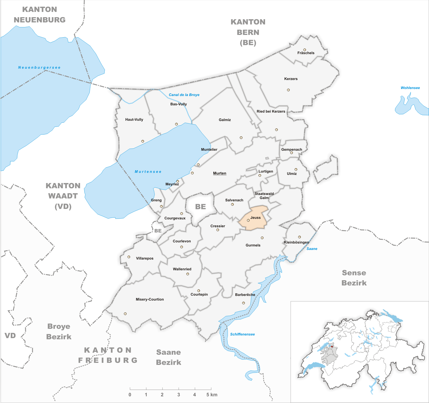 Municipality Jeuss